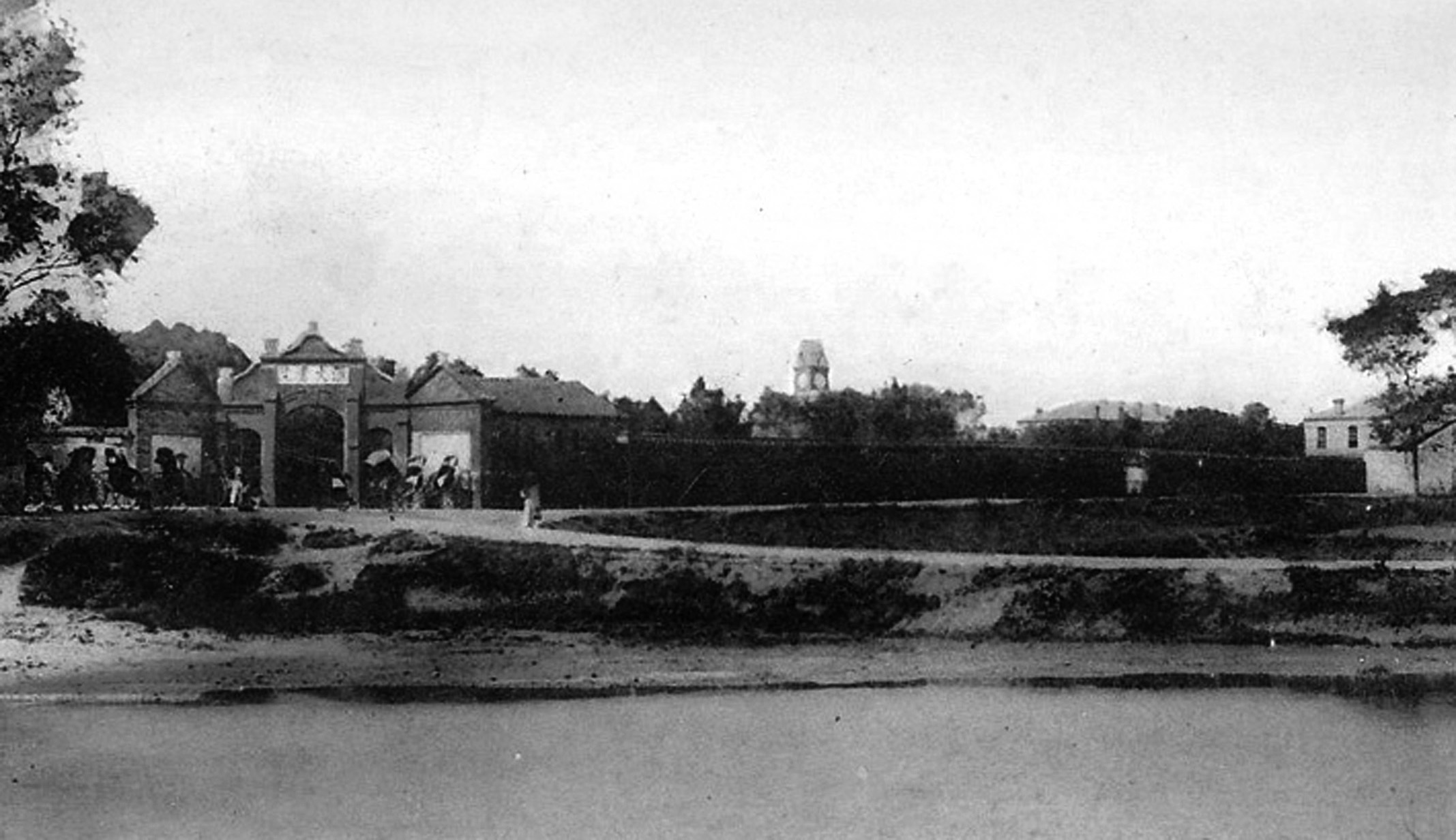 清末汇文书院干河沿大门外景照片，依稀可见门牌“汇文书院”和校园内钟楼等建筑。